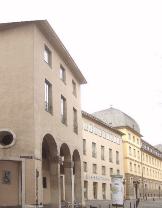 Bonn, Altes Stadthaus, „Siemens-Haus“ (2010 abgebrochen)